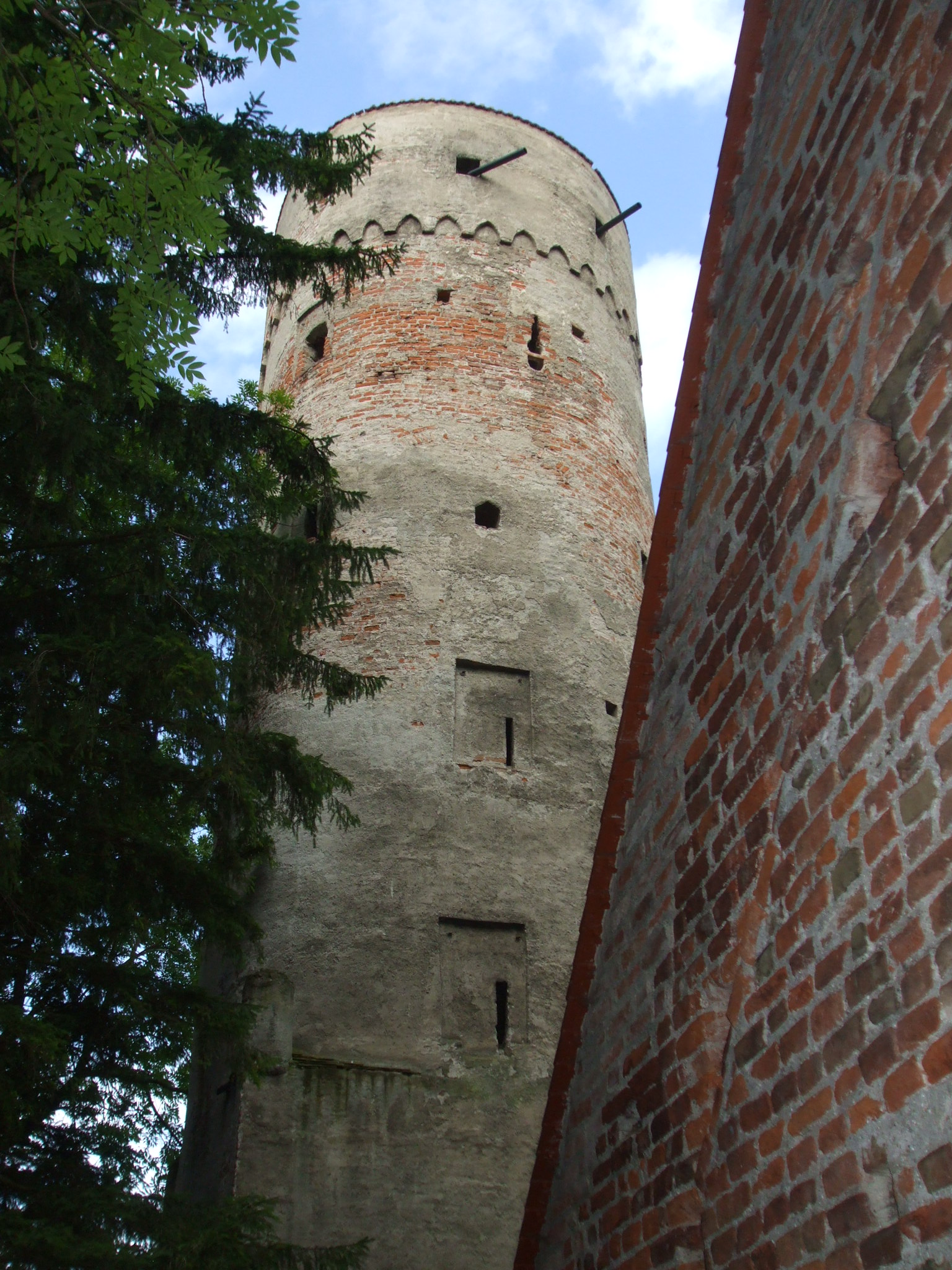 Dachlturm (seltener: Dohlenturm) oberhalb des Sandauer Tors in Landsberg am Lech